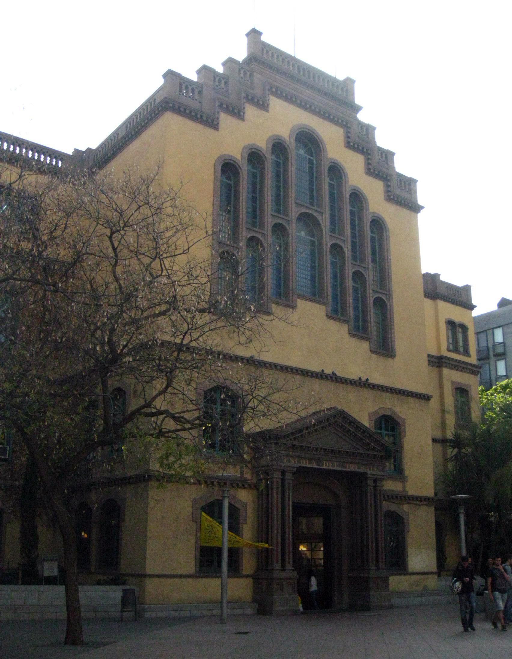 Conjunt del recinte de l'Escola Industrial (Barcelona)